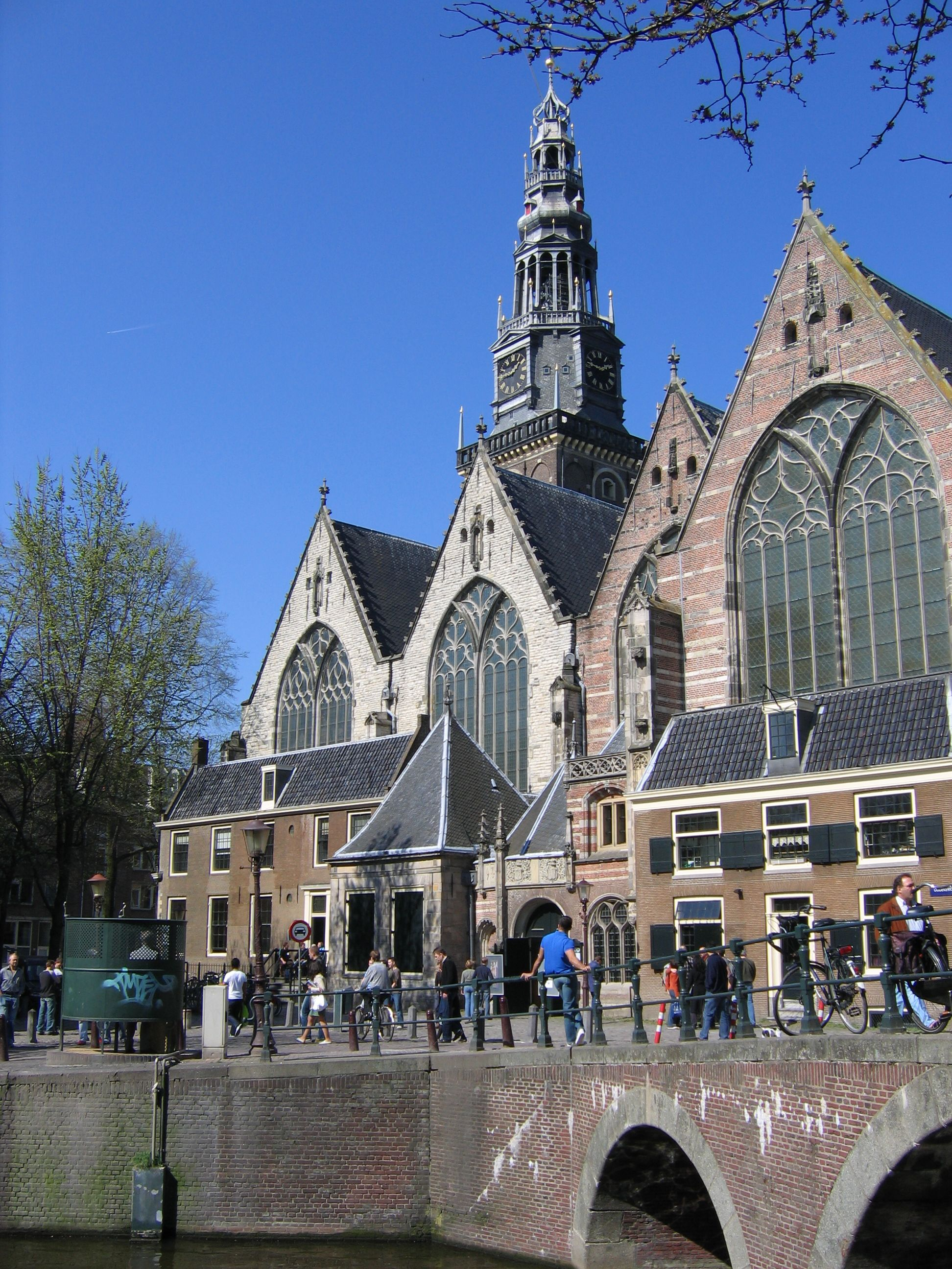 Amsterdam Oude Kerk (Old Church)